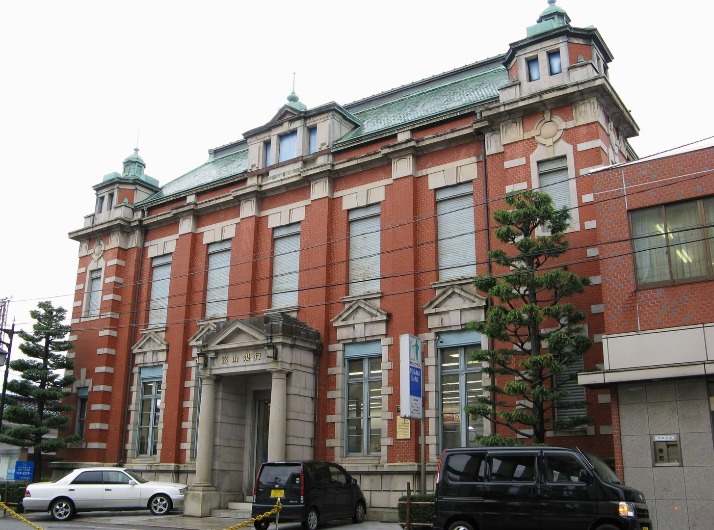 富山県高岡市にある富山銀行本店。